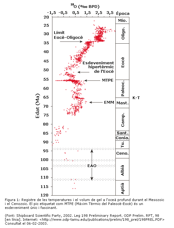 Registre de les temperatures i el volum de gel a l'oceà profund durant el Mesozoic i Cenozoic, indicat en concentració de 18O.